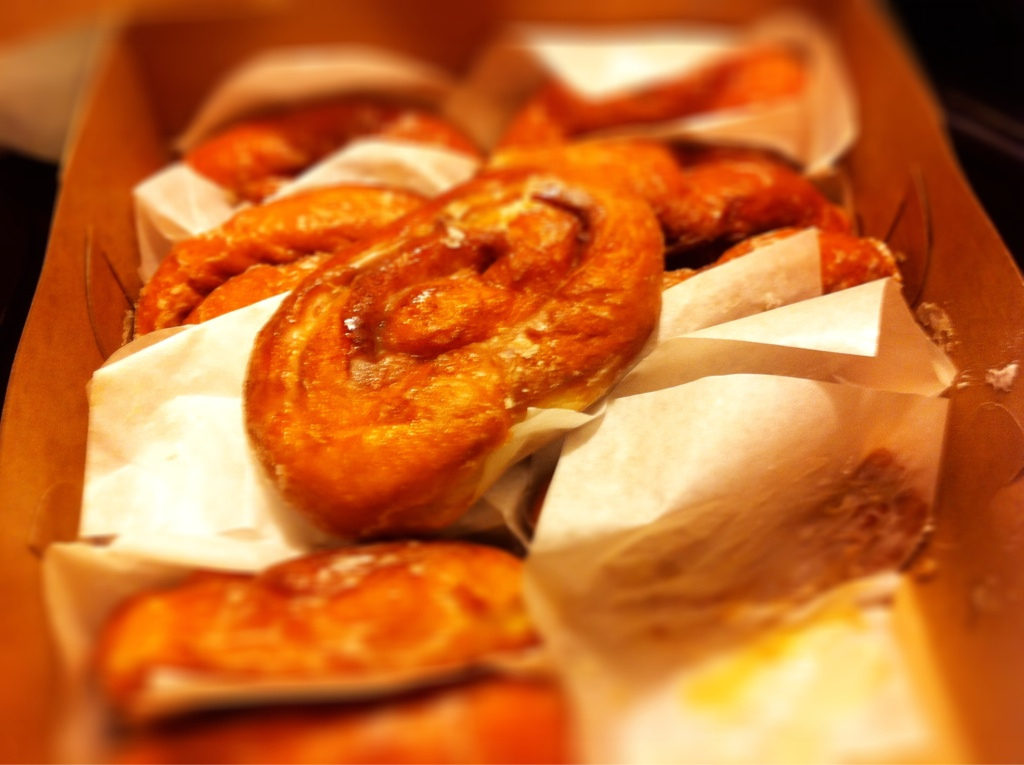 moby.to/ydwug4